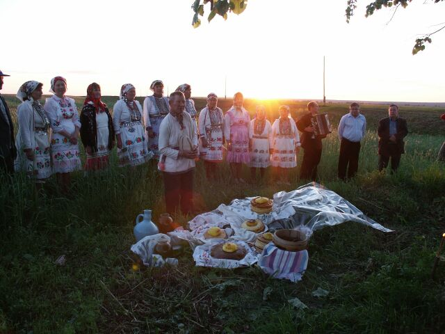 Marien semyk-juhla vuonna 2002. Pappi siunaa uhripuun juurelle kerätyt ruoat ja juomat.